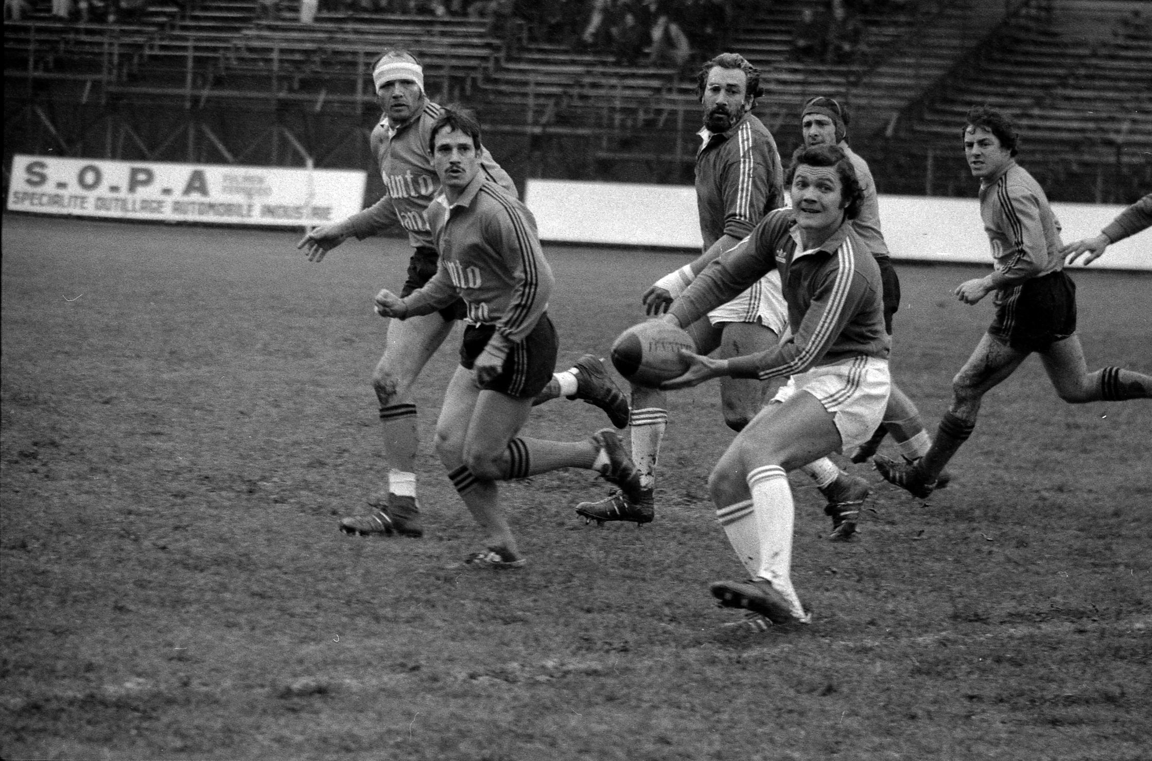 Stadium municipal de Toulouse, 1bis allées Gabriel-Biénès. 11 mai 1975. Finale du championnat de France de rugby à XIII, l'équipe du Toulouse Olympique XIII contre l'équipe de l'AS Saint-Estève. Cliché pris durant le match ; au 1er plan action de jeu ; en arrière-plan gradins avec spectateurs.